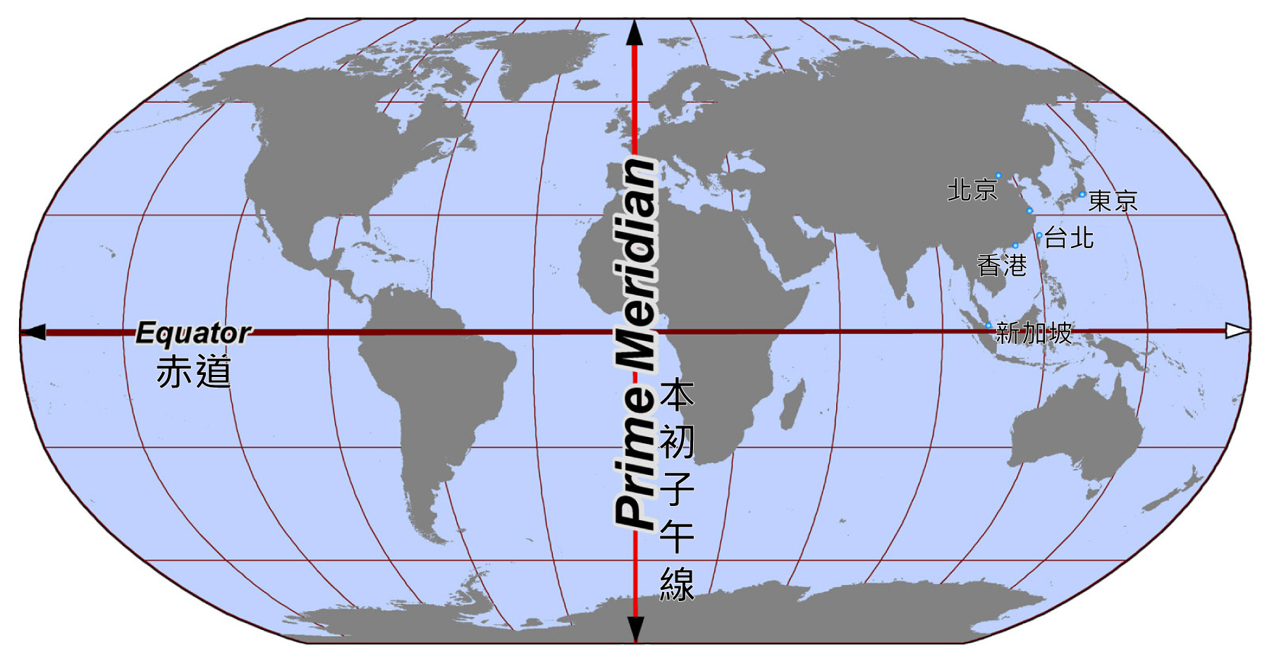 赤道、本初子午線及東亞部分都市位置圖